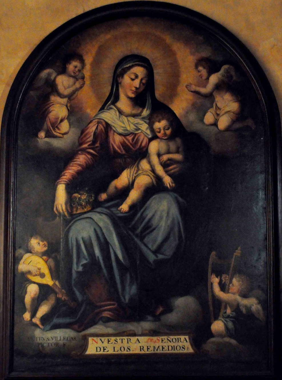 Virgen de los Remedios, oleo sobre tabla, 192 x 144 cm, tabla central del primitivo retablo de la capilla de la Virgen de Vargas en la parroquia de San Vicente de Sevilla